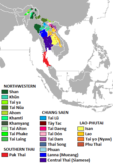 Lenguas Tai suroccidentales.